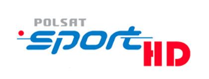 Logo des Senders Polsat Sport HD